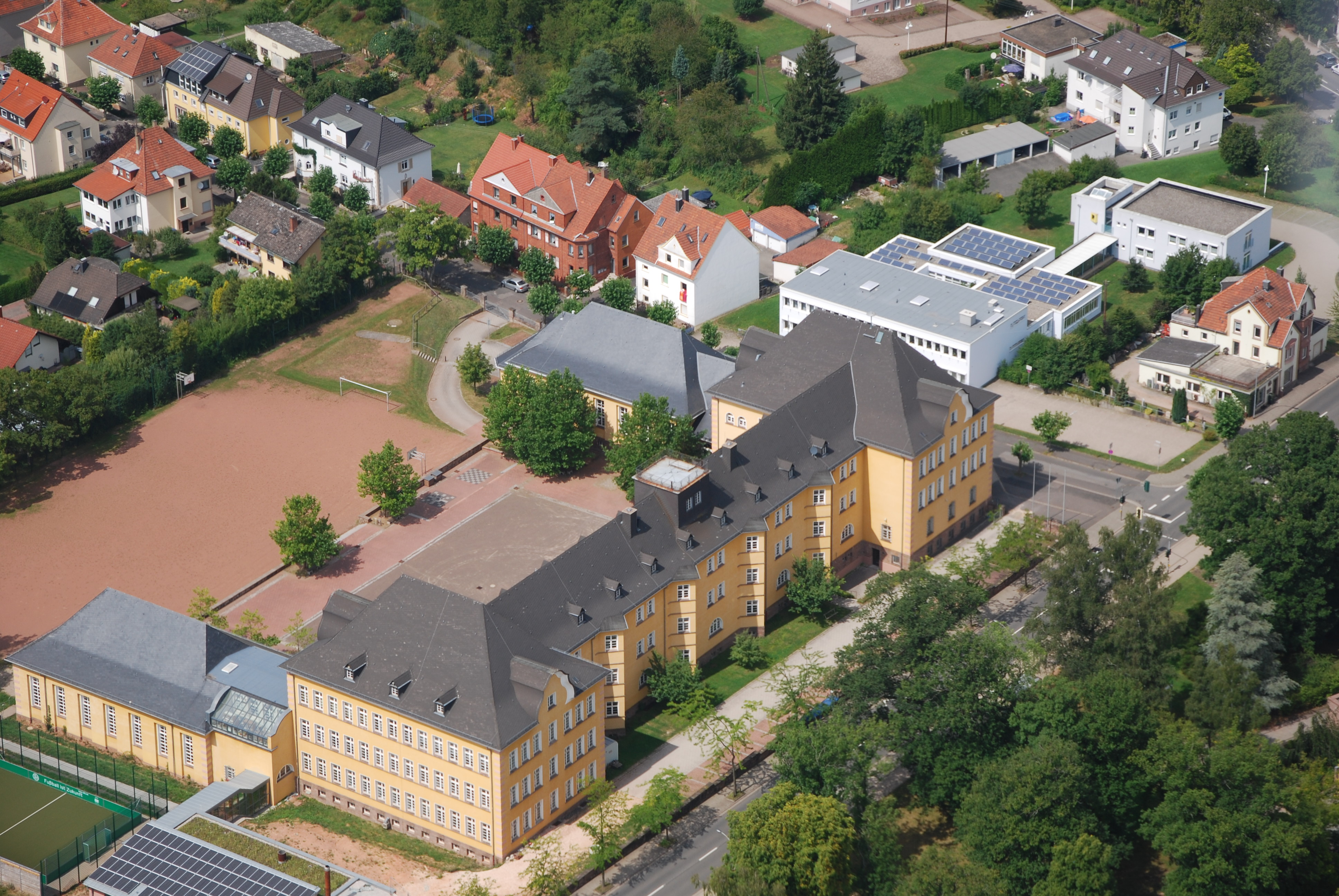 Luftaufnahme des Gymnasium Wendalinum in St. Wendel. In der Mitte das Hauptgebäude mit Turnhalle (links) und Aula (rechts). Unten links das DFB-Minispielfeld mit Umkleideräumen. Oben rechts im Bild das St. Wendeler Amtsgericht.